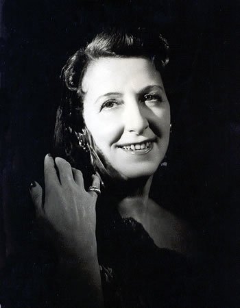 Archivo: José Luis Jiménez